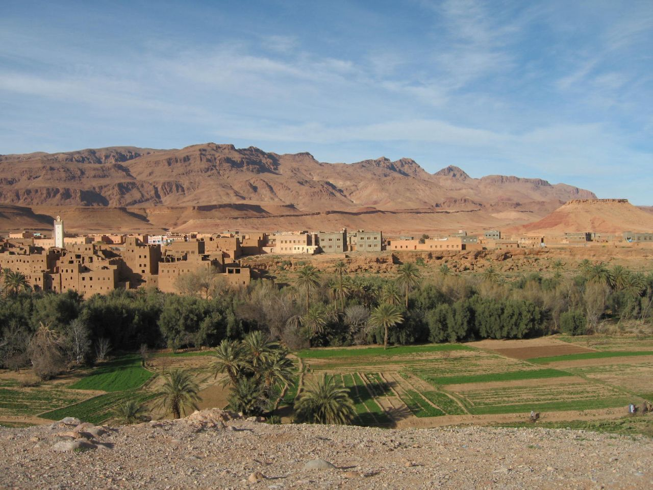 Erfoud, Tafilalt region, Morocco